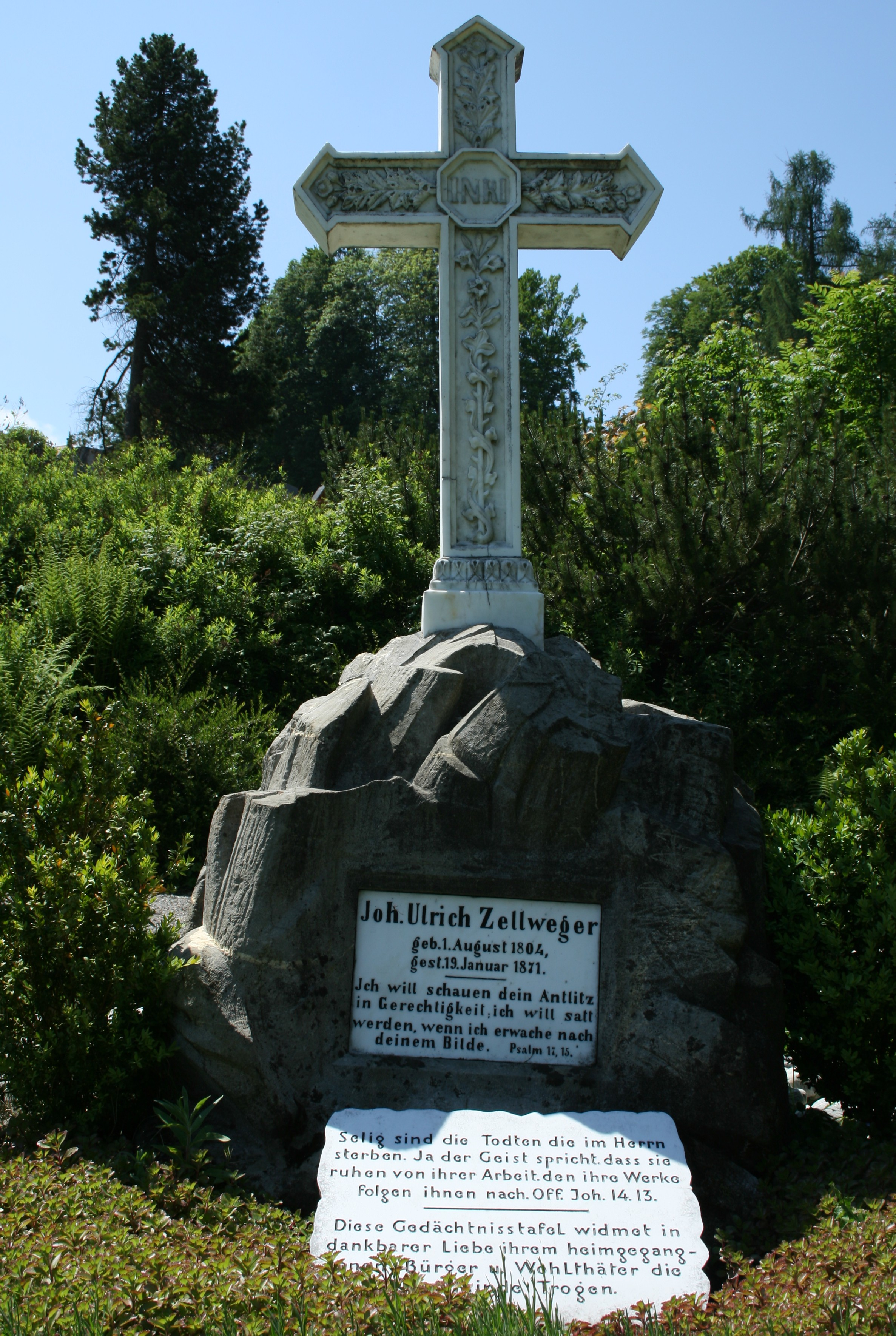 Grabmal von Ulrich Zellweger auf dem Friedhof in Trogen AR